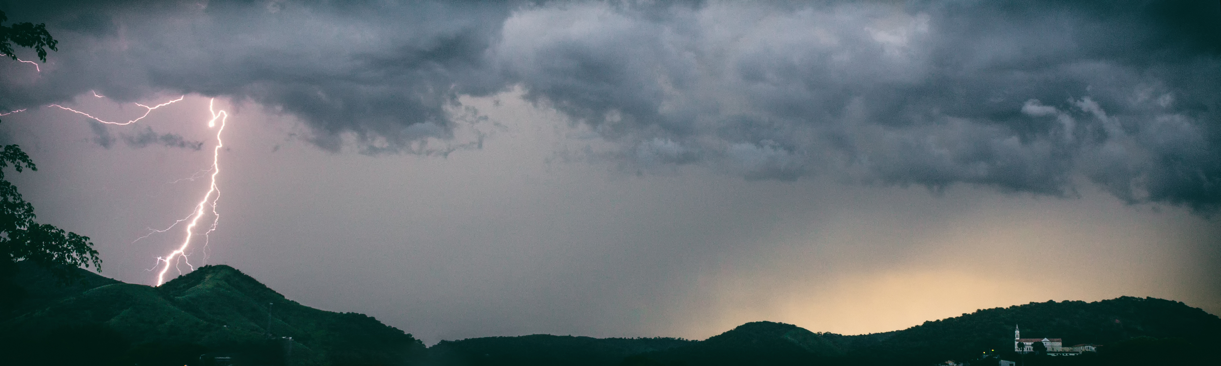 Fotografia de uma tempestade de raios sobre a cidade de Itambacuri/MG.